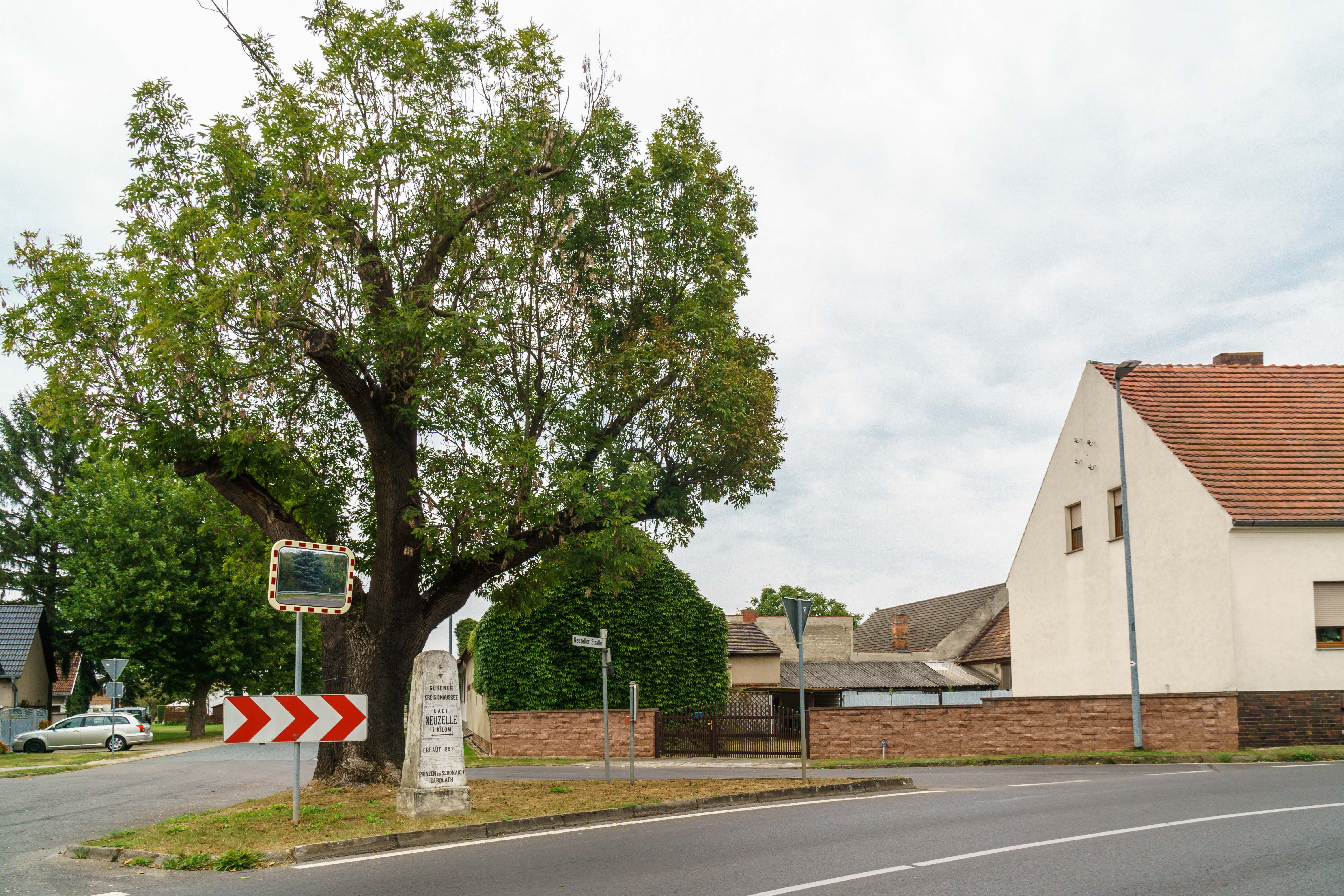 Chausseestein an der Neuzeller Straße in Bresinchen OT von Guben